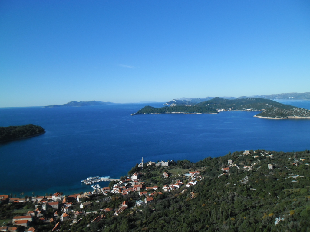 pogled sa Sutvrača na Lopudu